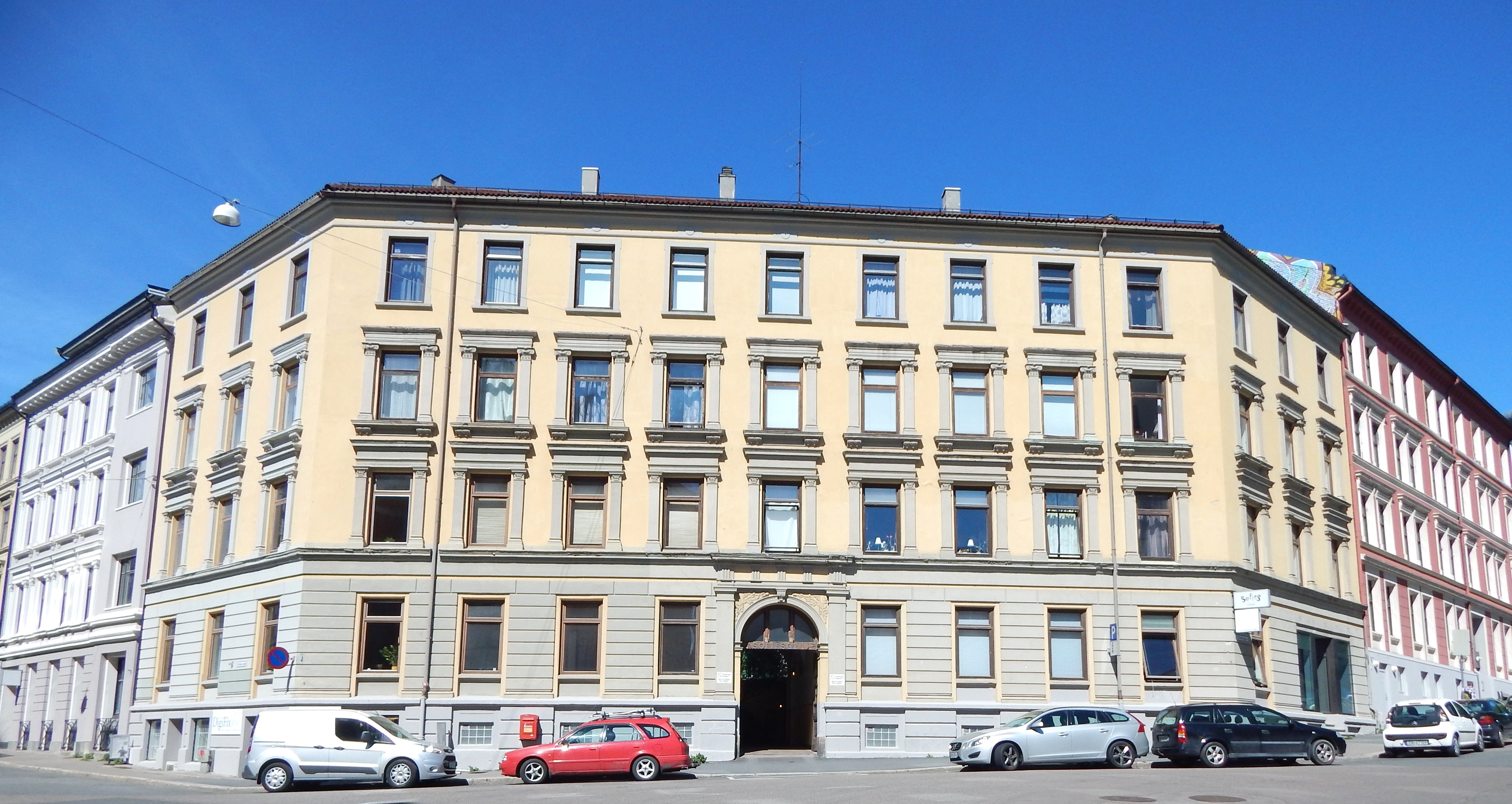 Sofies gate 1 ved Stensberggata